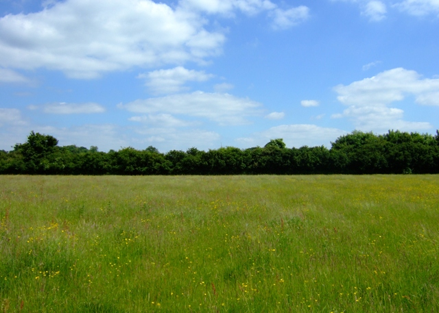 Upwood Meadows